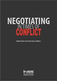 NEWOTIANTING IN TIMES OF CONFLICT